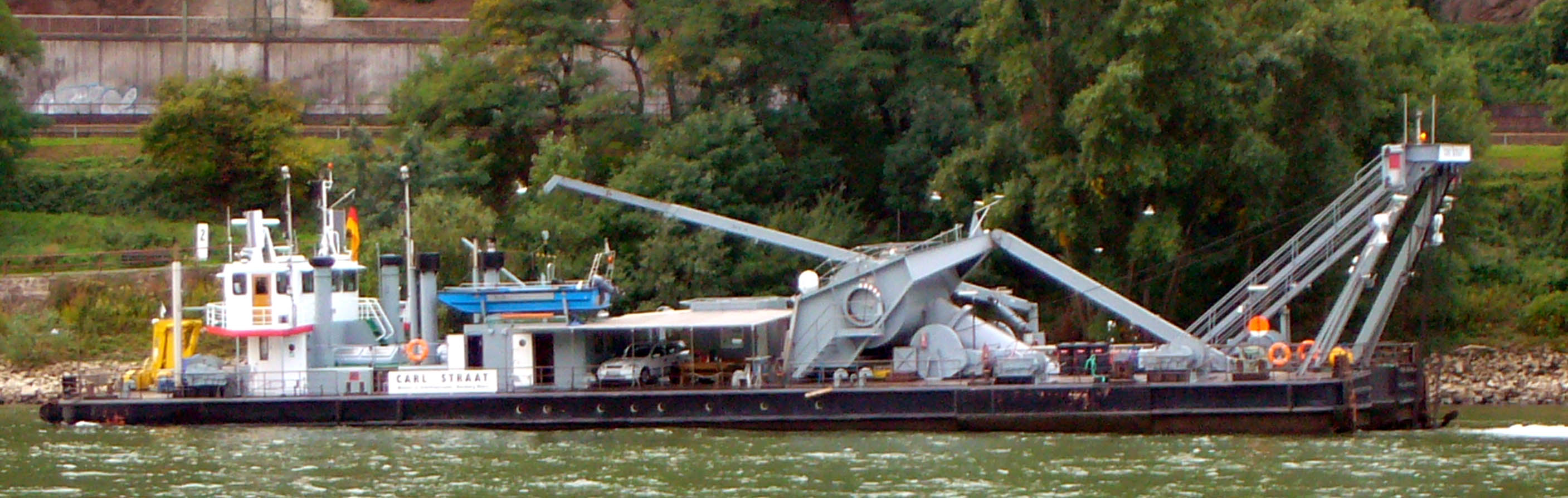 Tauchglockenschiff CARL STRAAT im Einsatz TGS "Carl Straat" des Wasser- und Schifffahrtsamtes Duisburg-Rhein Heimathafen: Duisburg Baujahr: 1963 Bauwerft: Ohrenstein & Koppel/Lübecker Technische Daten: L = 52,00 m, B= 11,80 m, T= 1,60 m Antriebsleistung: 2 x 280 PS Motor: Zylinder MAN Diesel Antrieb: 2 x Voith Schneider Propeller Einsatzgebiete: Rhein und Mosel